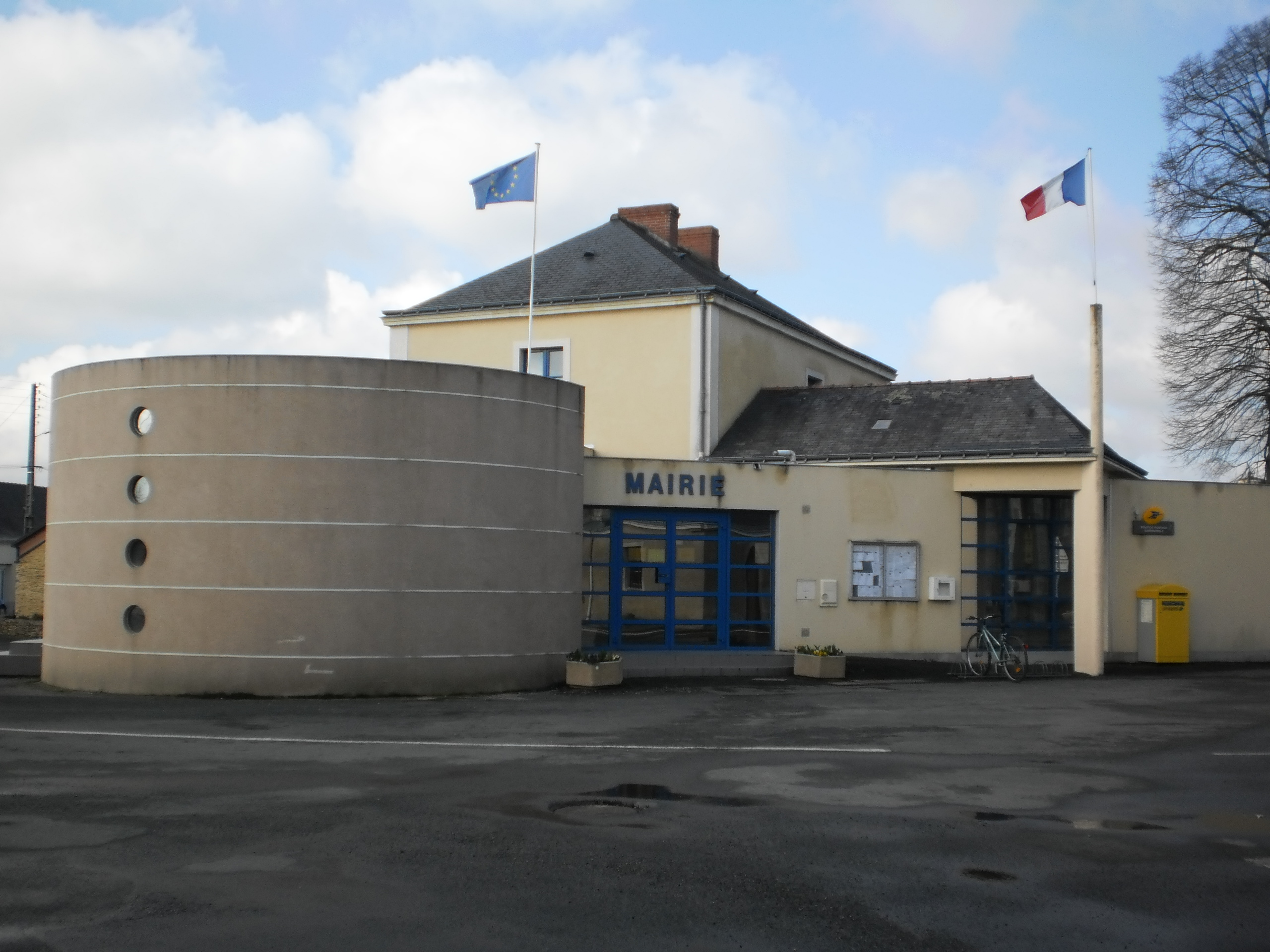 Saint-Sulpice-des-Landes (Loire-Atlantique, France) - mairie